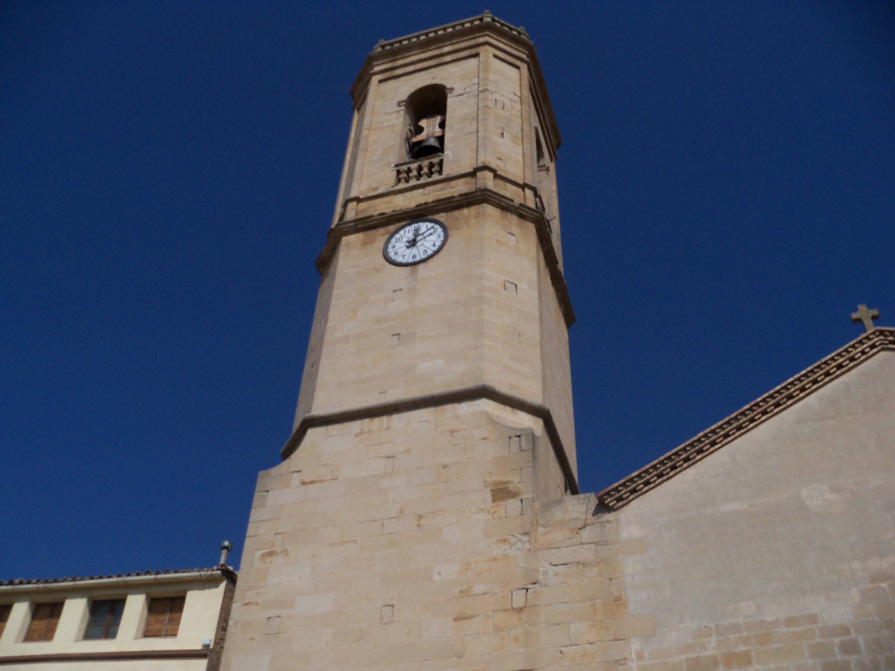 Església parroquial de l'Assumpta (Torregrossa)